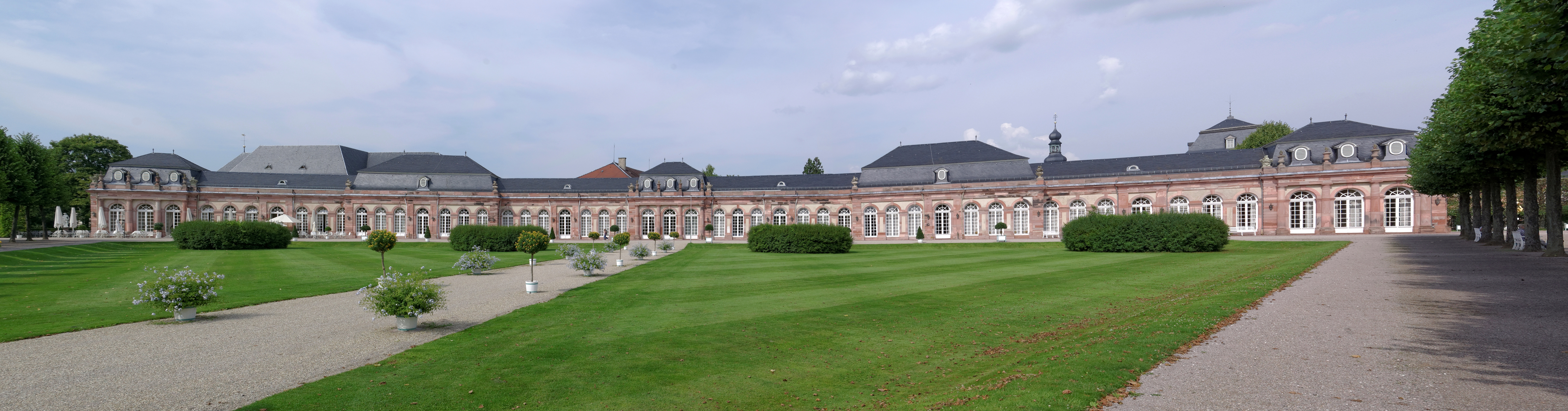 Schwetzingen, Schloß, nördlicher Zirkelbau